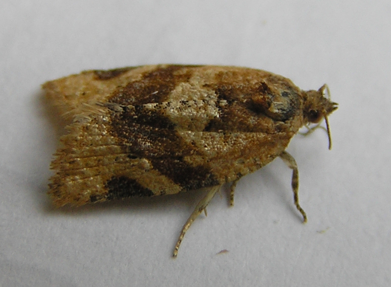 Epagoge grotiana